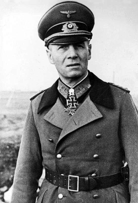 Generalfeldmarschall Rommel, der im Auftrage des Führers sich von der hohen Abwehrbereitschaft und Schlagkraft der deutschen Befestigungen in Dänemark und an der Atlantikküste überzeugte. Unser Bild zeigt die neueste Aufnahme des Generalfeldmarschalls. PK-Aufnahme-Kriegsberichter: Winkelmann (Sch.) [herausgegeben am] 31.12.43